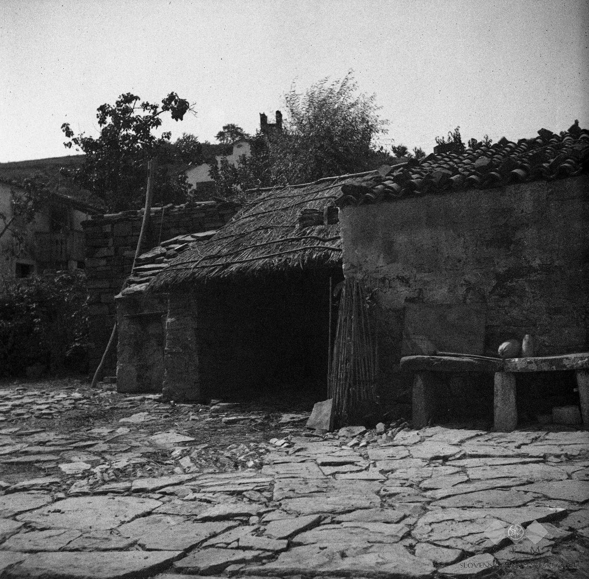 S slamo krita "lupa" za voz in shrambo drugih stvari, Babiči.